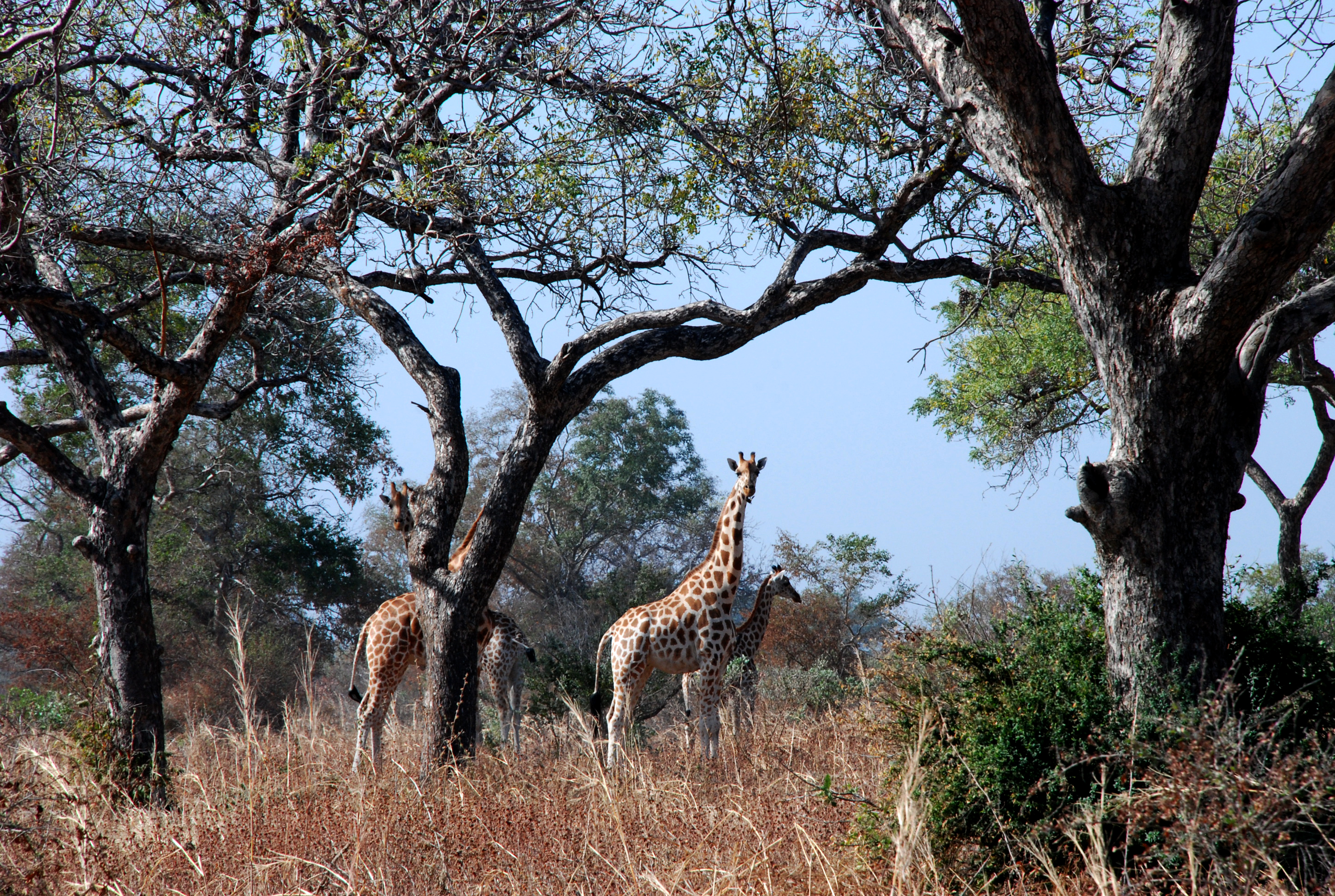 Parc de Waza dans le nord Cameroun